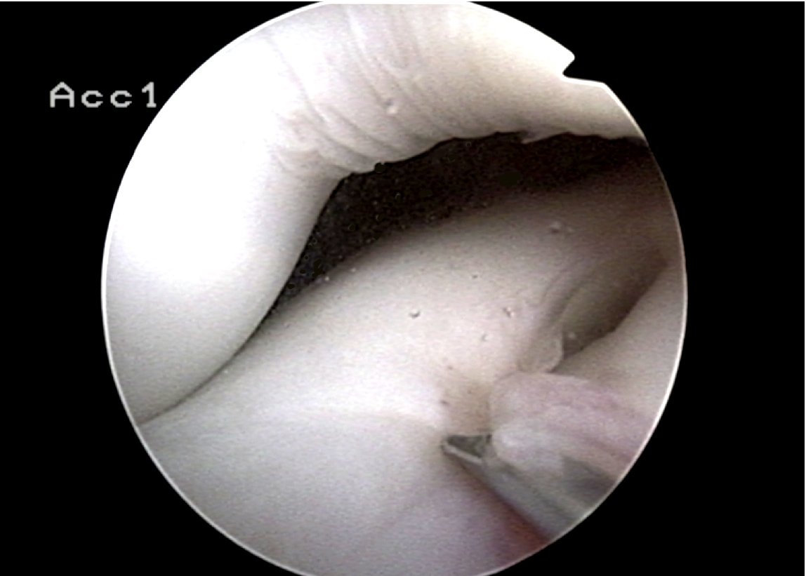 Scheibenmenikus im Arthroskop